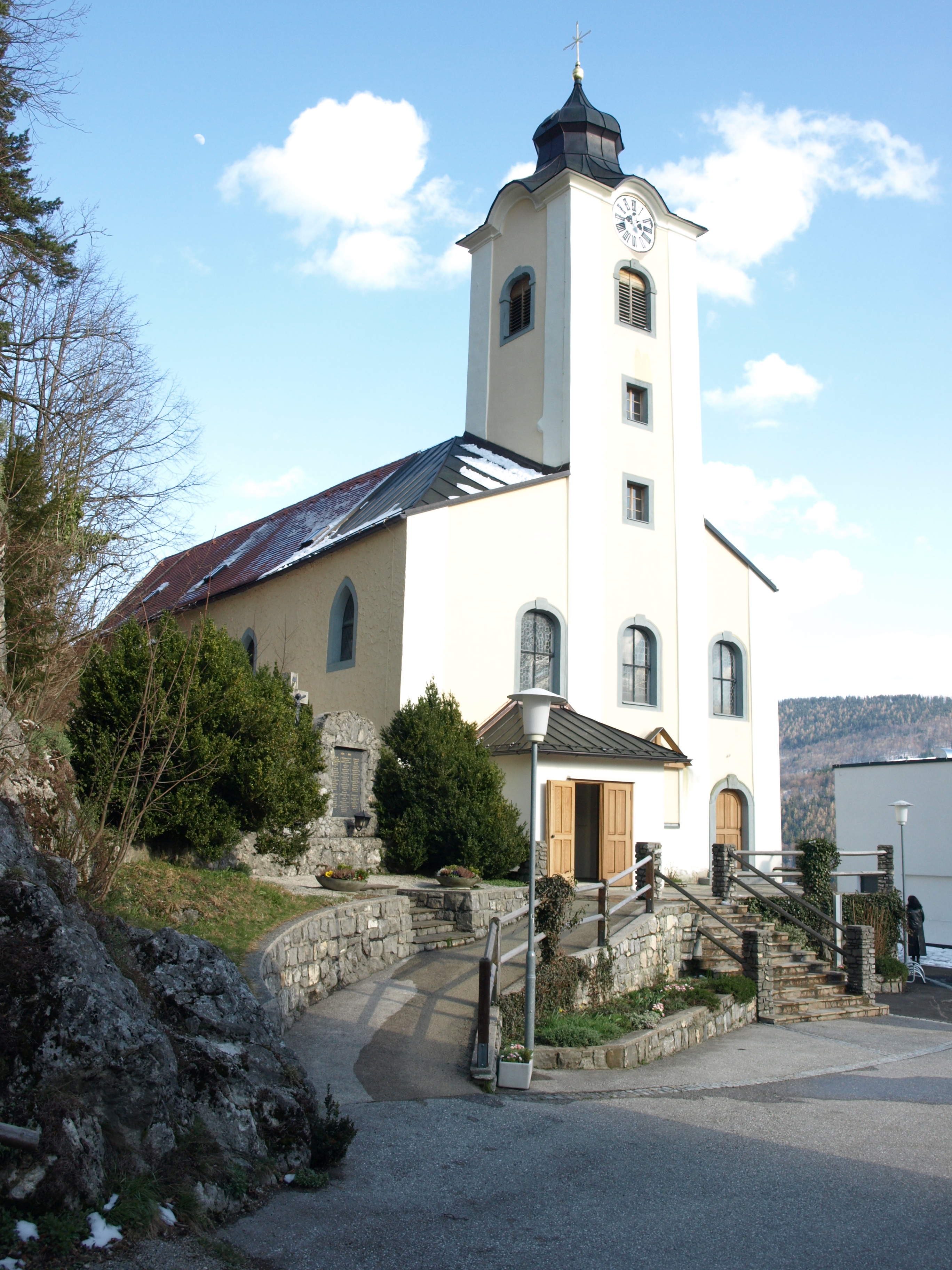 Kath. Pfarrkirche hl. Nikolaus